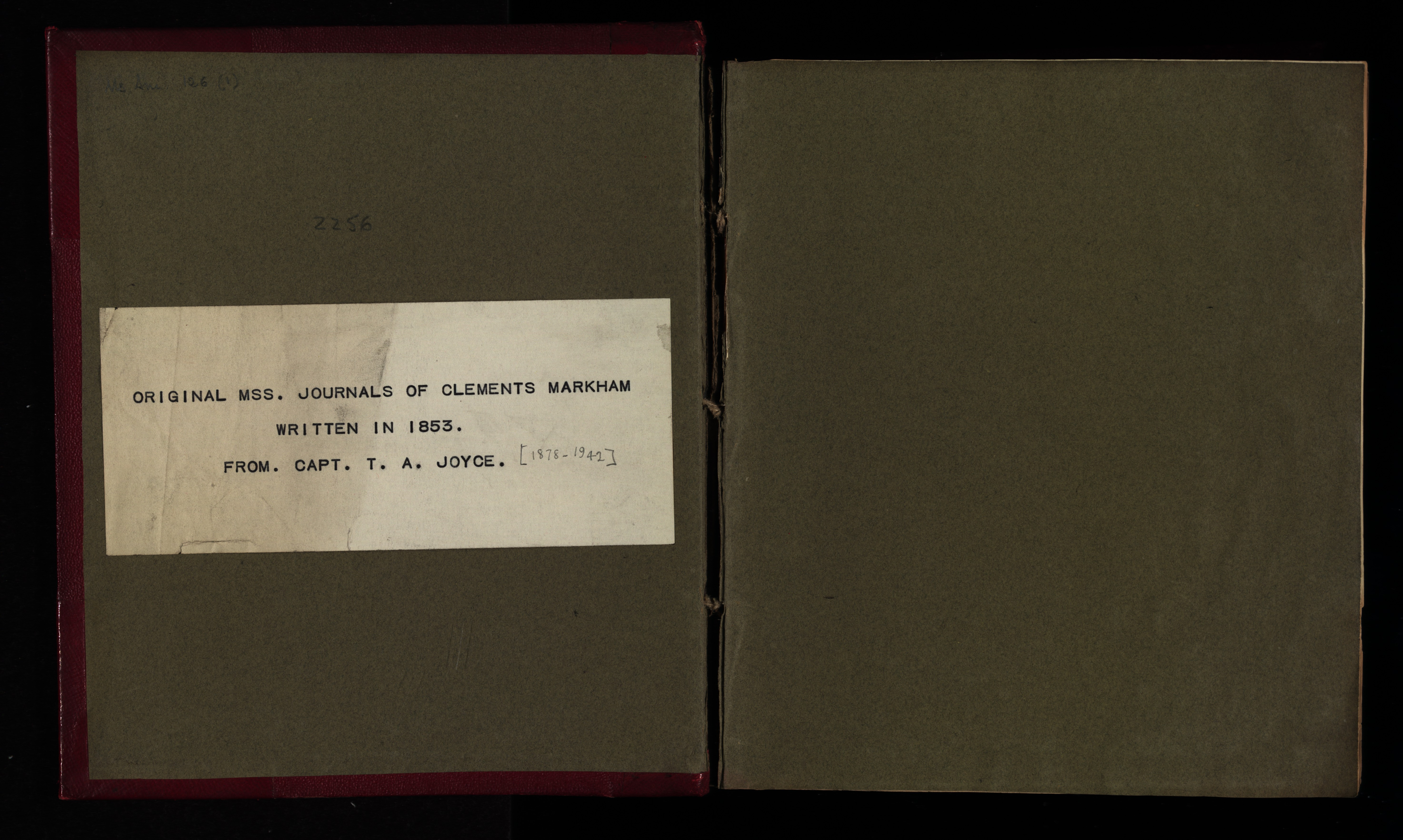 Wellcome Images